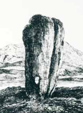 Odin-Stone Todesjahr unbekannt. Bild ist im 19. Jahrhundert entstanden. - Vor Dezember 1814 muss es entstanden sein (Danach wurde der Stein zerstört).